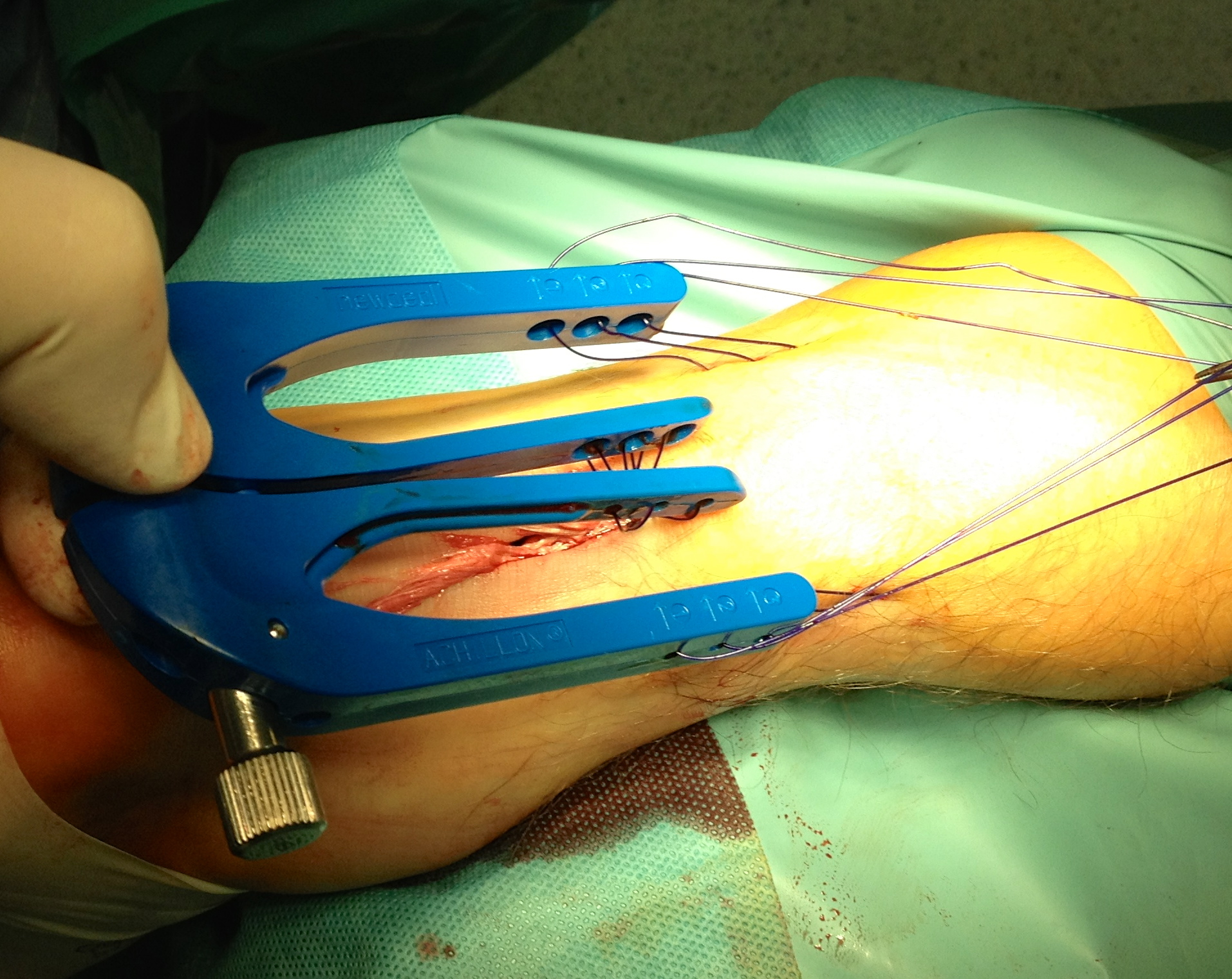 Achillessehnennaht MIC-Technik. Durchzug der vorgelegten Fäden